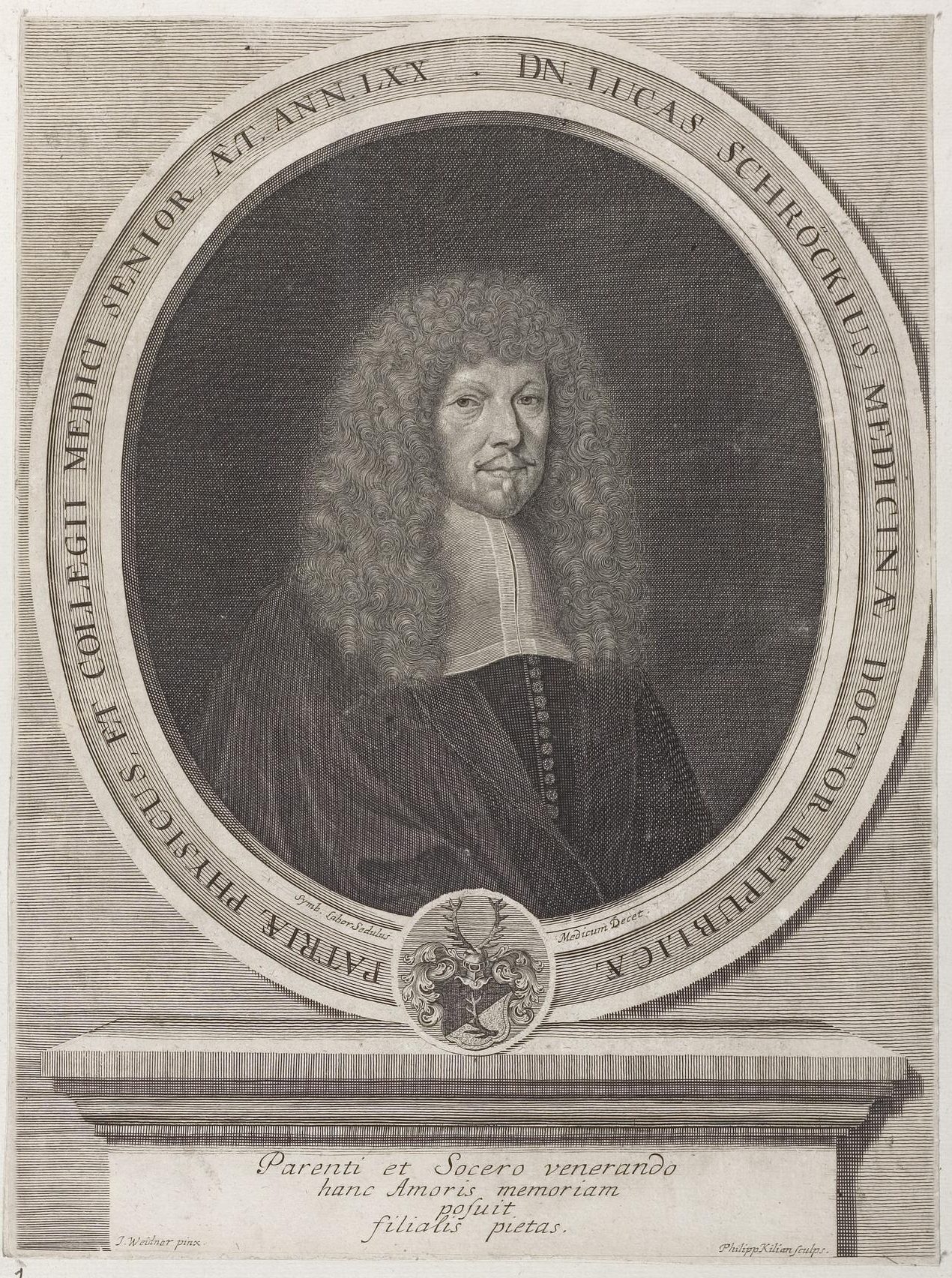 Grafik aus dem Klebeband Nr. 3 der Fürstlich Waldeckschen Hofbibliothek Arolsen Motiv: Lucas Schroeck (1646–1730), Mediziner und Naturforscher